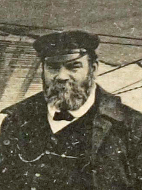 carte postale avec Latham Levavasseur de la collection de Mme Bieri.